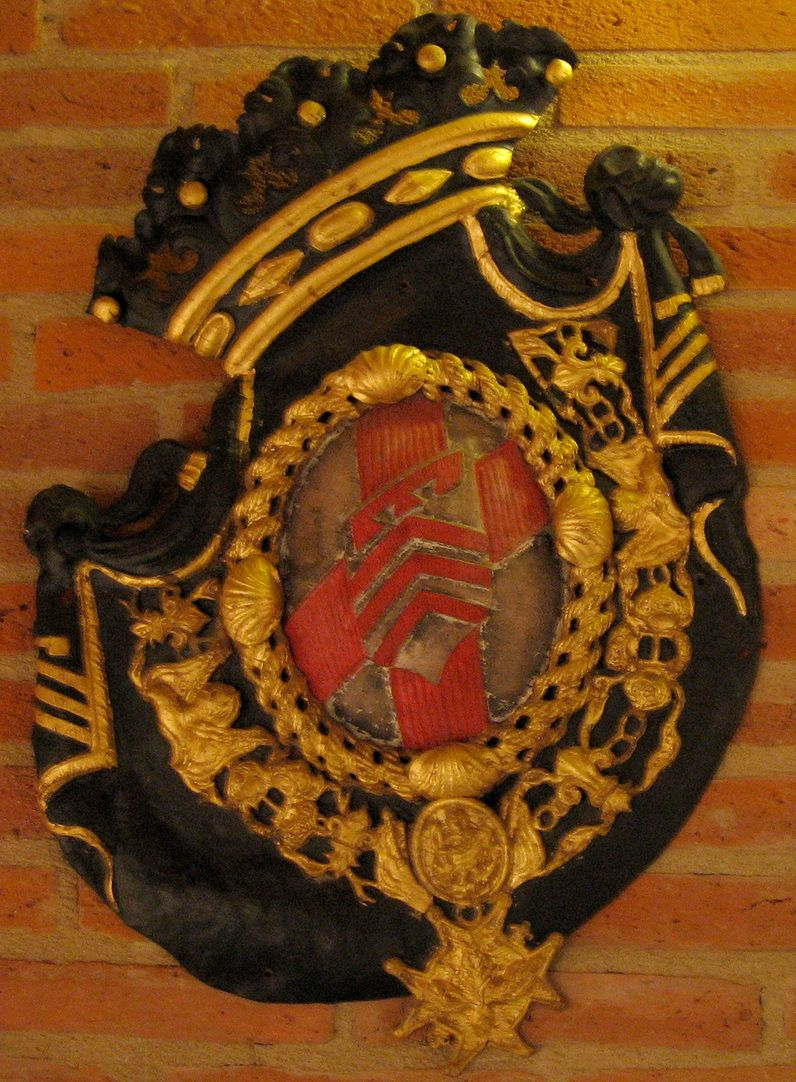 Blason de Emmanuel Armand de Vignerot du Plessis, Duc d'Aiguillon et Pair de France - Bois peint - Musée Paul Dupuy (Toulouse)